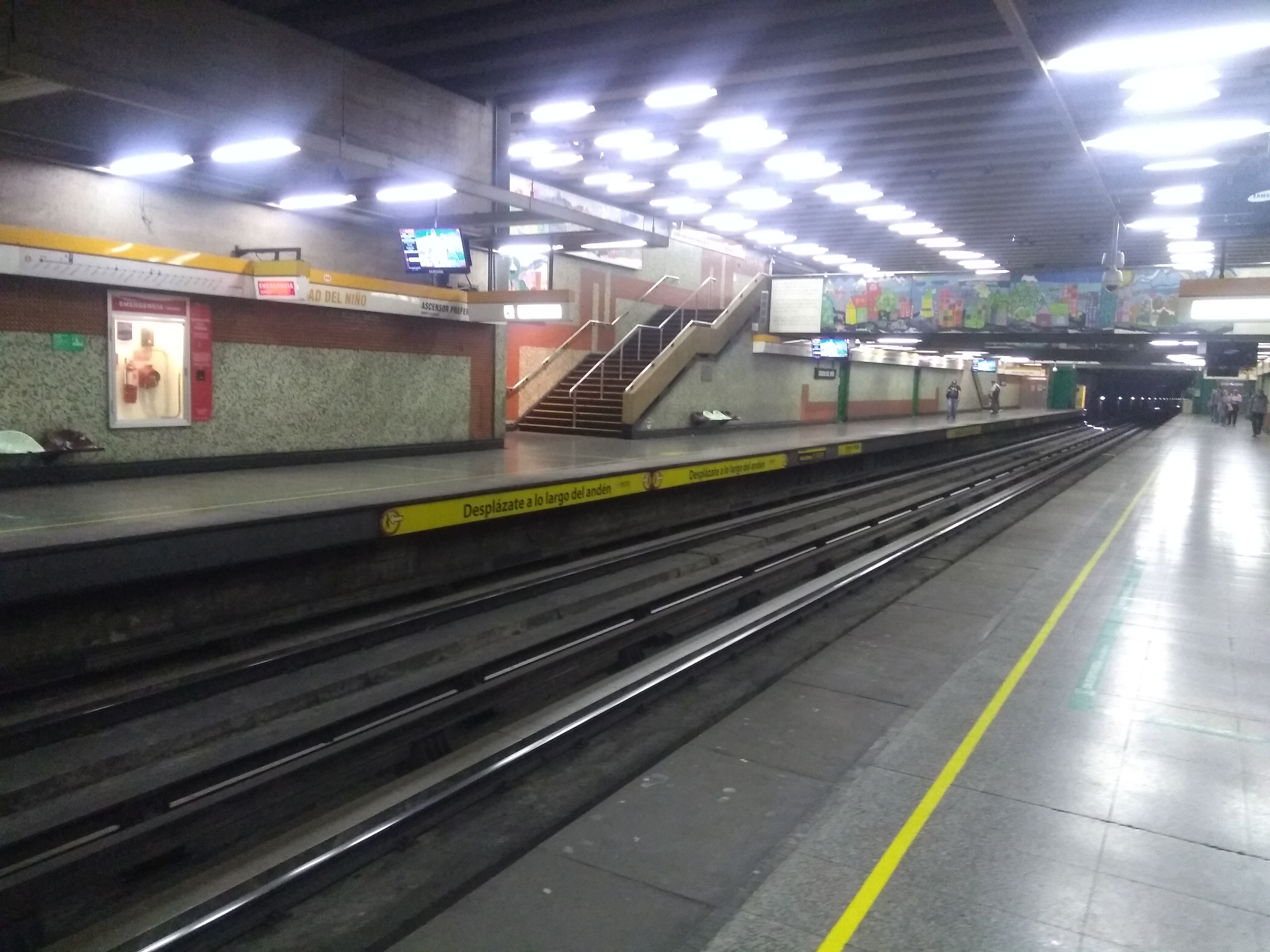 Estación Ciudad del Niño de la L2, ubicada en la comuna de San Miguel.